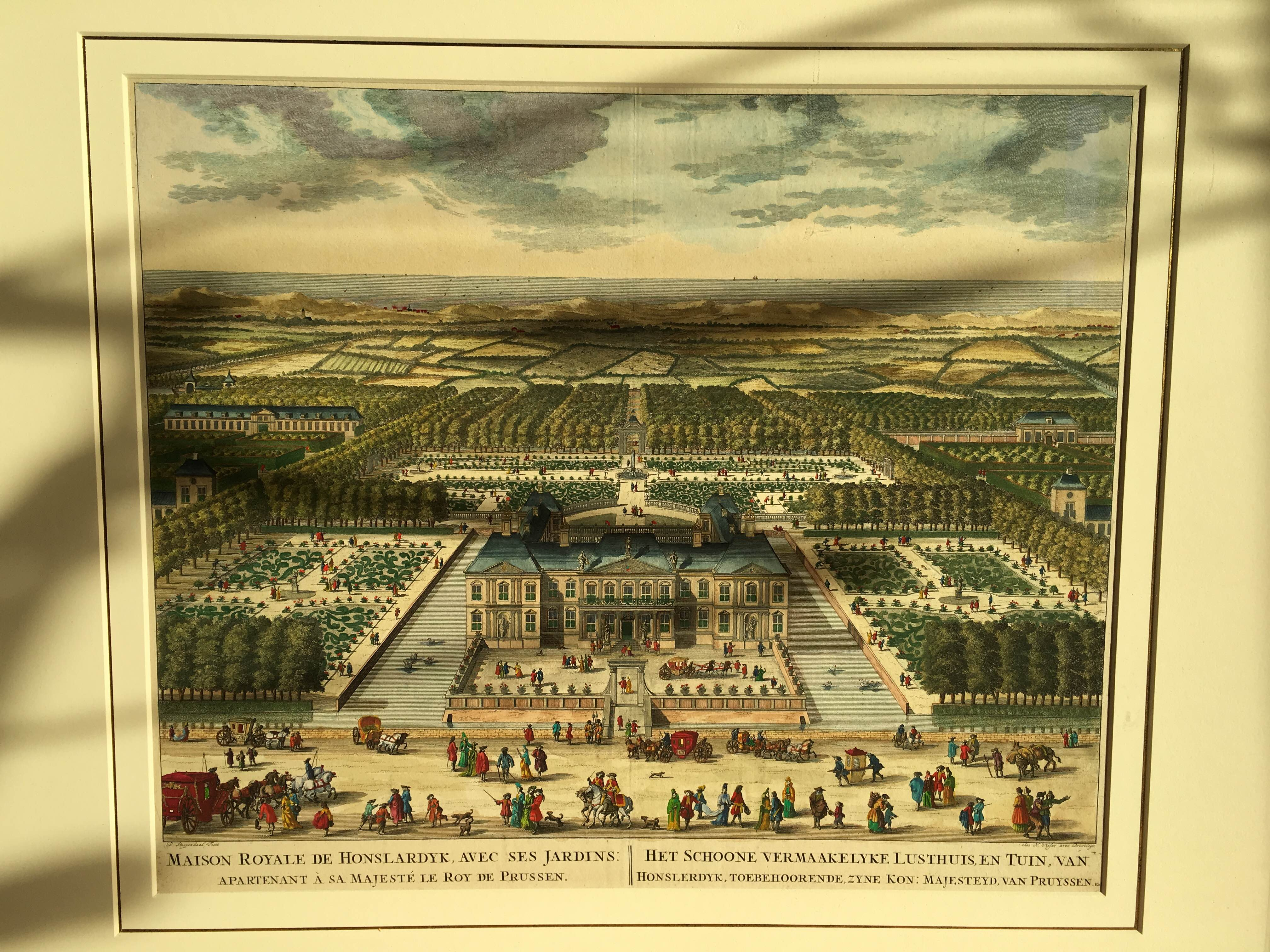 Paleis Honselaarsdijk in vogelvlucht, Daniël Stopendaal, Nicolaes Visscher (II), onbekend, 1682 - 1726: Het schoone vermaakelijke lusthuis, en tuin, van Honslerdyk, toebehoorende, zyne kon: majesteyd, van Pruyssen / Maison Royale de Honslardyk, avec ses jardins: apartenant à sa majesté le roy de Prussen (titel op object) Gezicht op Paleis Honselaarsdijk met de tuinen en landerijen in vogelvlucht. Op het voorplein een koets met vier paarden. Op de voorgrond koetsen, een draagstoel, elegant geklede wandelaars, ruiters, bedelaars en kooplieden. (DH collectie/ DH Collection)